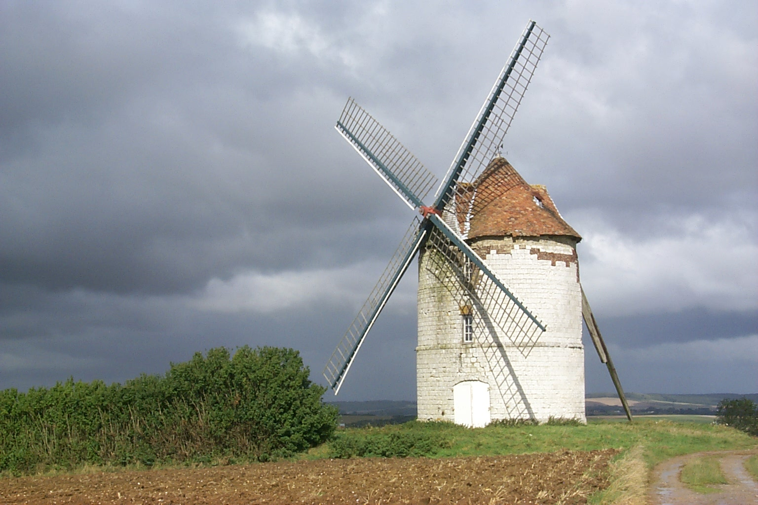 Moulin à vent de Nortbécourt dit moulin Lebriez (commune de Mentque-Nortbécourt FR-62) Photo prise en Septembre 2005 par S. Leicht